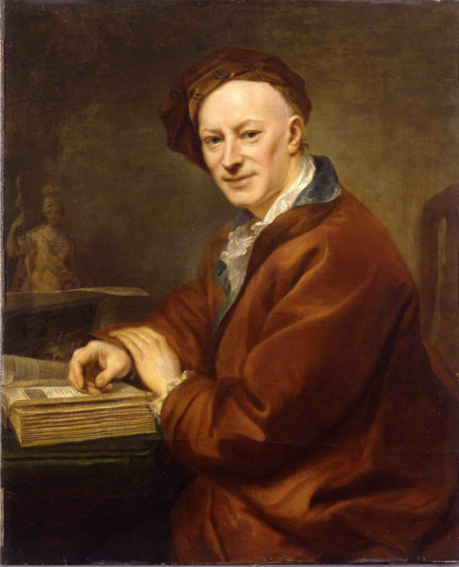 Portrait of georg Friedrich Brandes